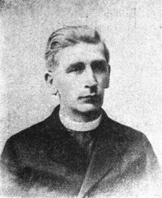 Österreichischer Politiker, Reichsratswahl 1907, Name siehe Dateiname